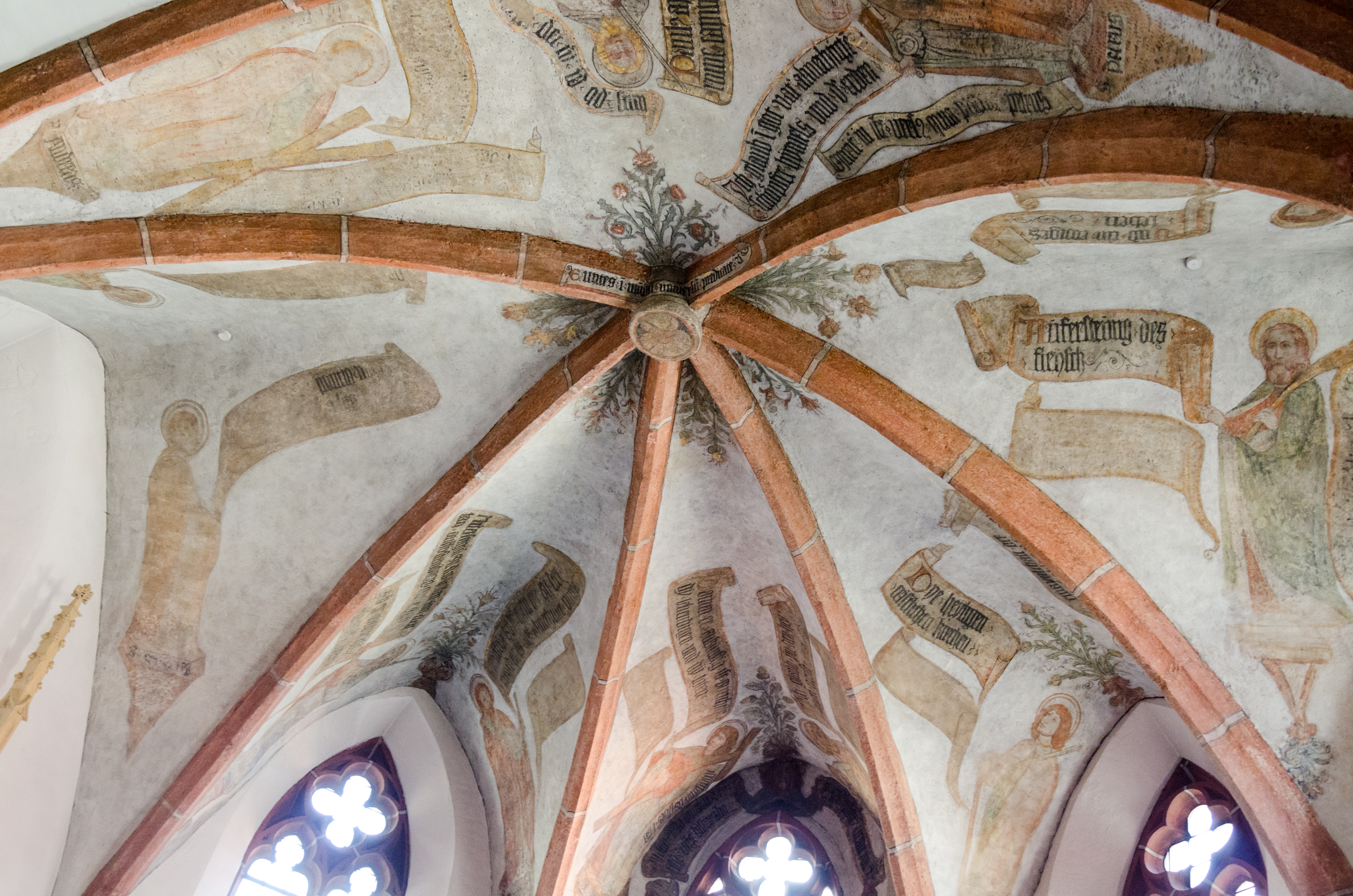 Marktredwitz, Evangelisch-lutherische Pfarrkirche St. Bartholomäus